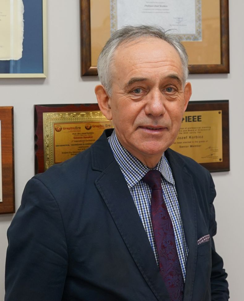 prof. dr hab inż. Józef Korbicz, Uniwersytet Zielonogórski, 2019 r.